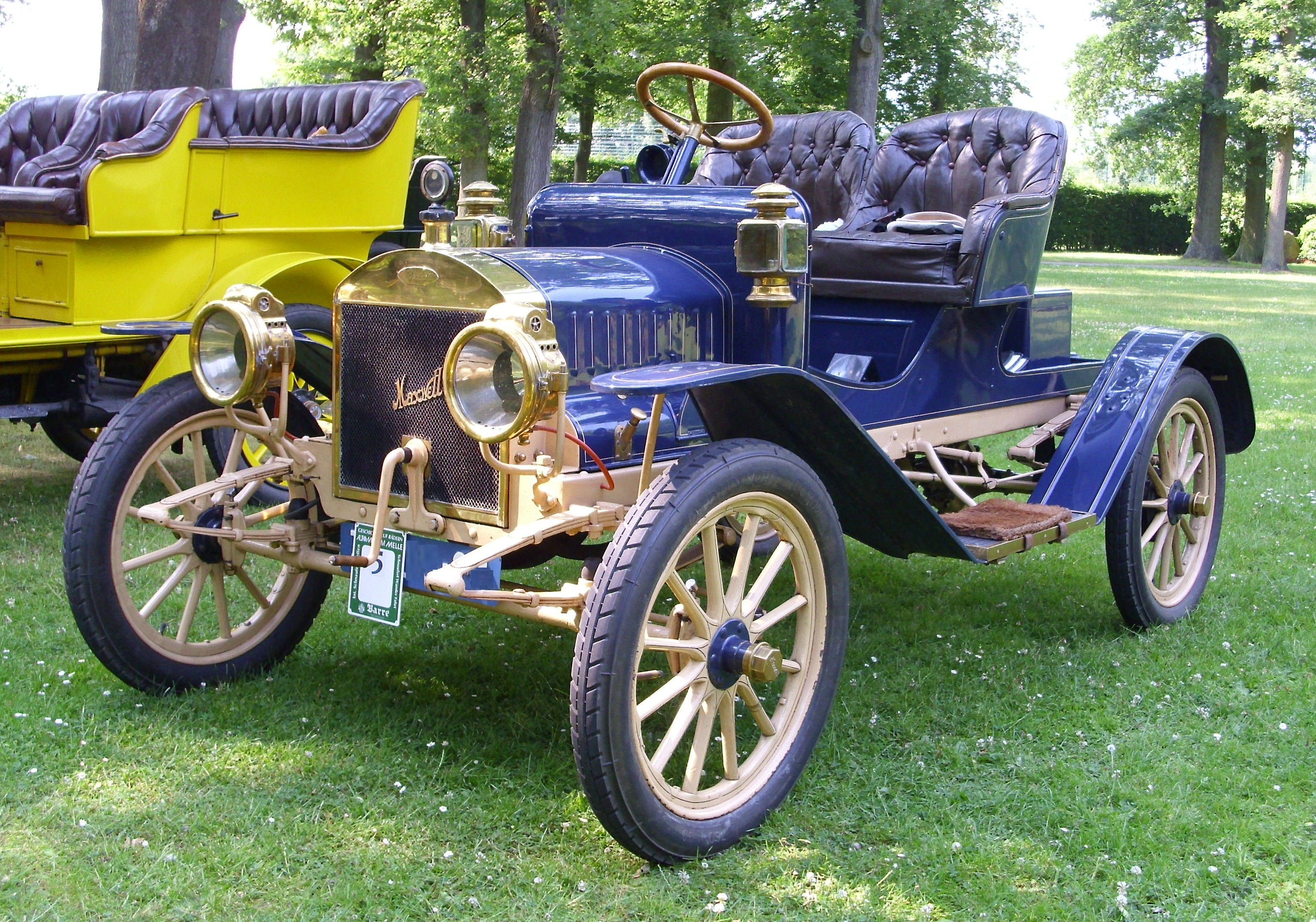 Maxwell von 1911